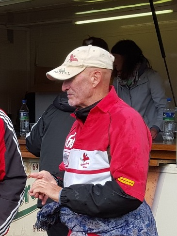 Detlef Krüger am 15. April 2016